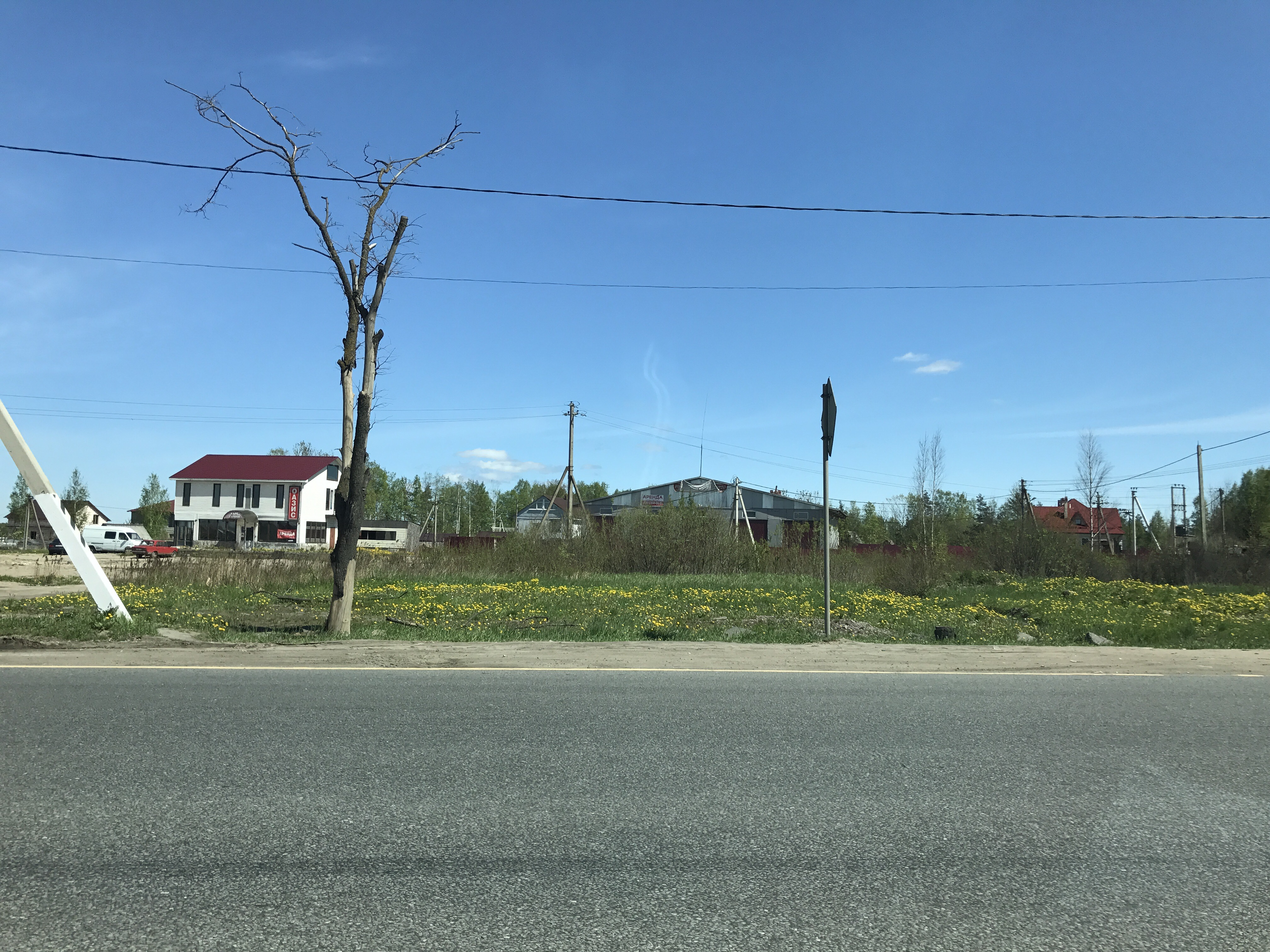 Е105 у Ям-Ижоры